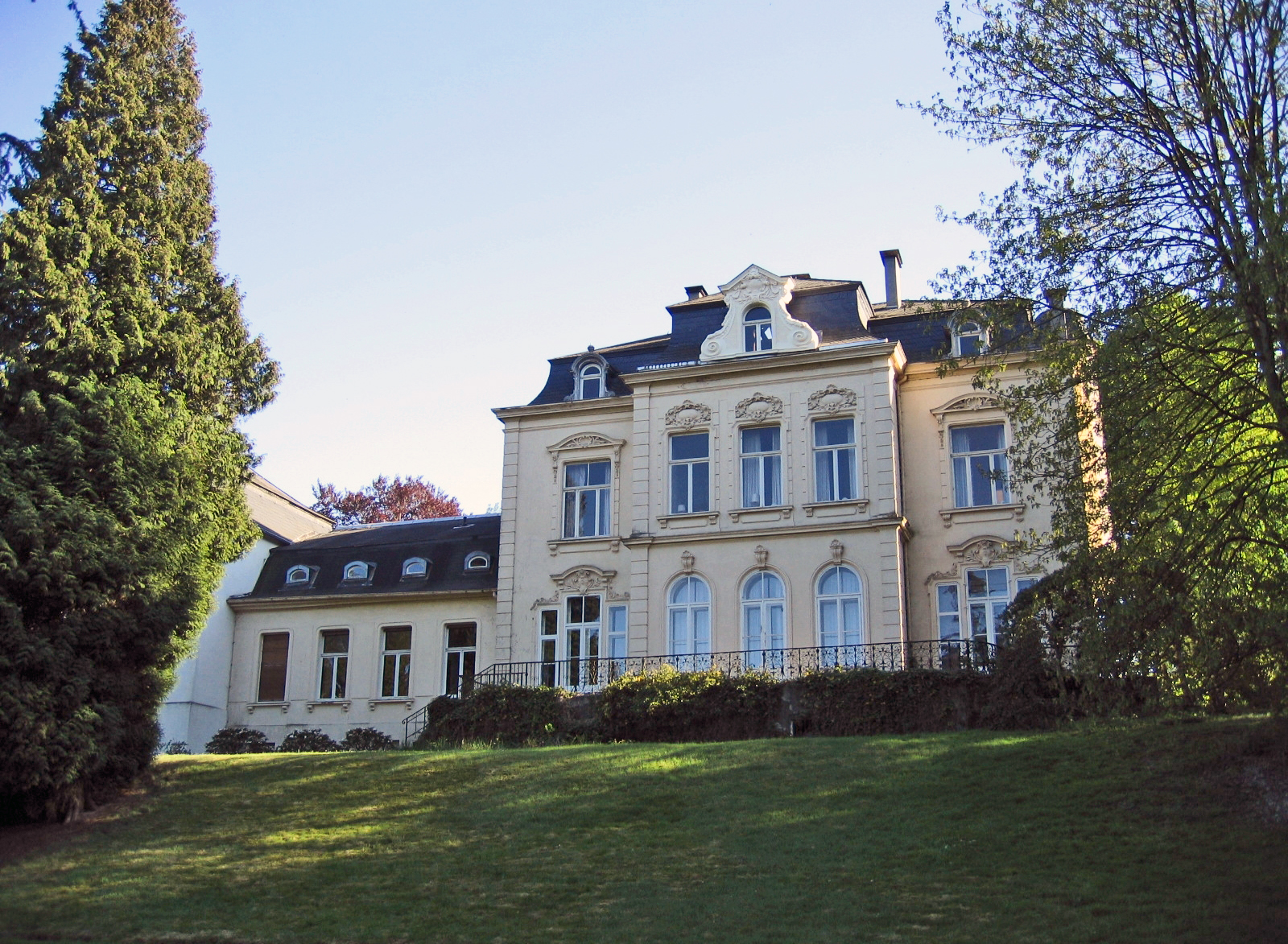 Ehemaliges Schloss Dahlhausen (Privatbesitz) in Menden-Halingen.